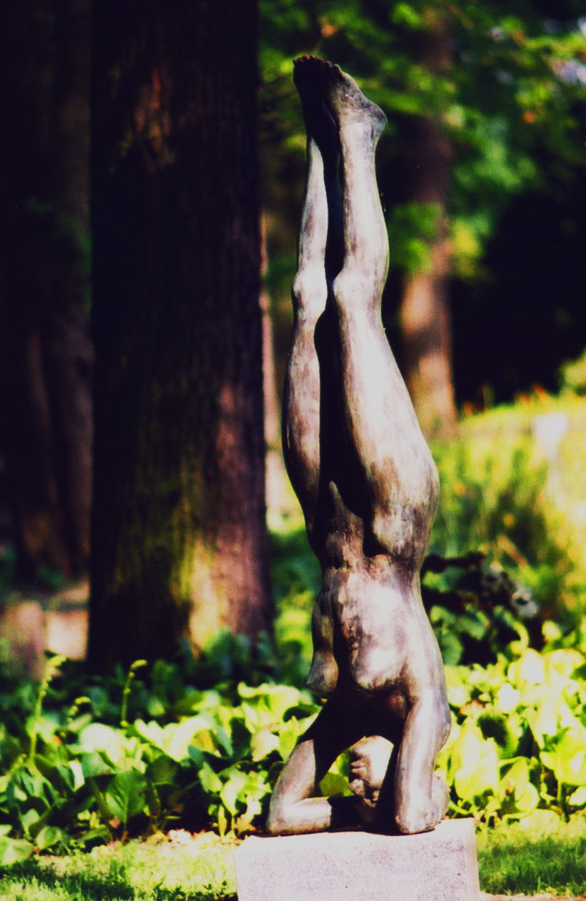 35 Krämmer, Andreas: "Kopfstehende". Bronzeguss, 1996